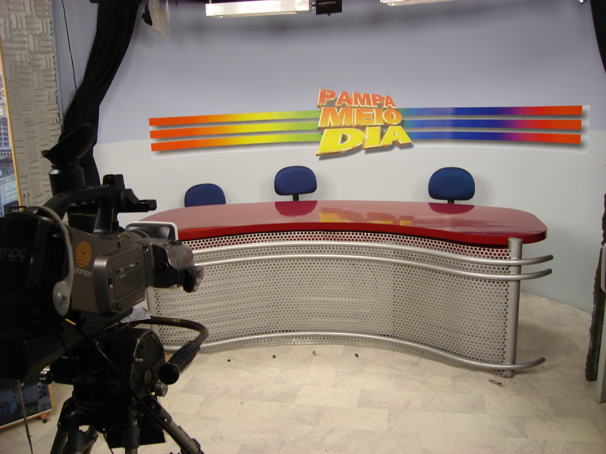 Estúdio do Pampa Meio Dia de Pelotas.